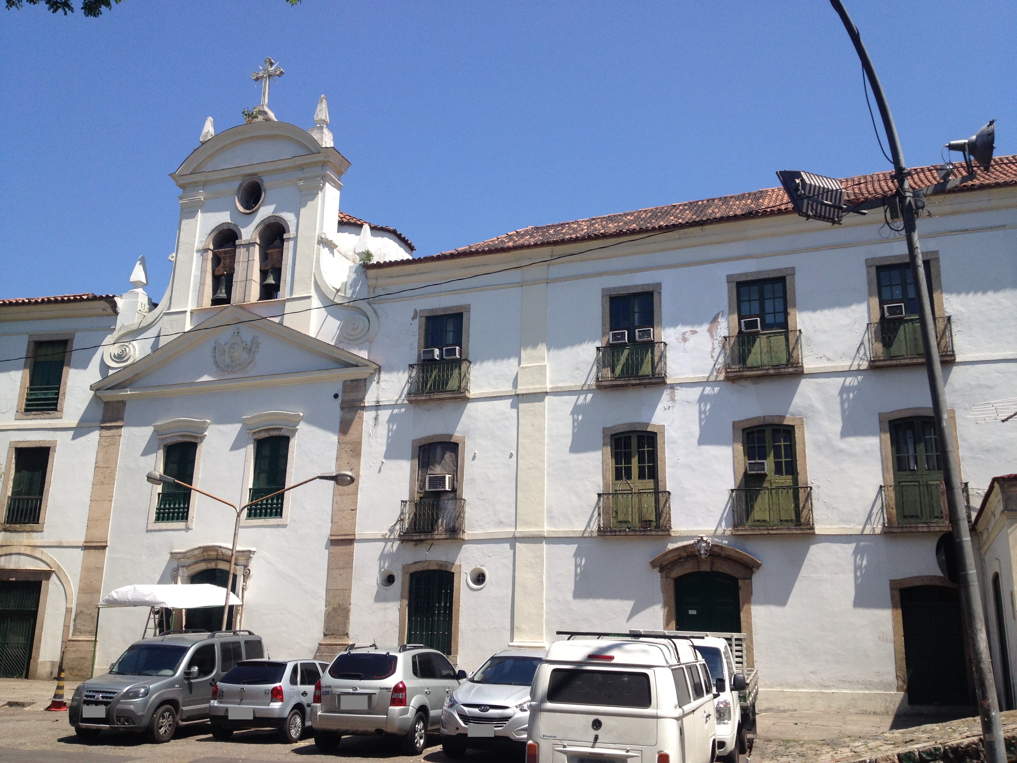 Visão frontal da Igreja de Nossa Senhora do Bonsucesso.